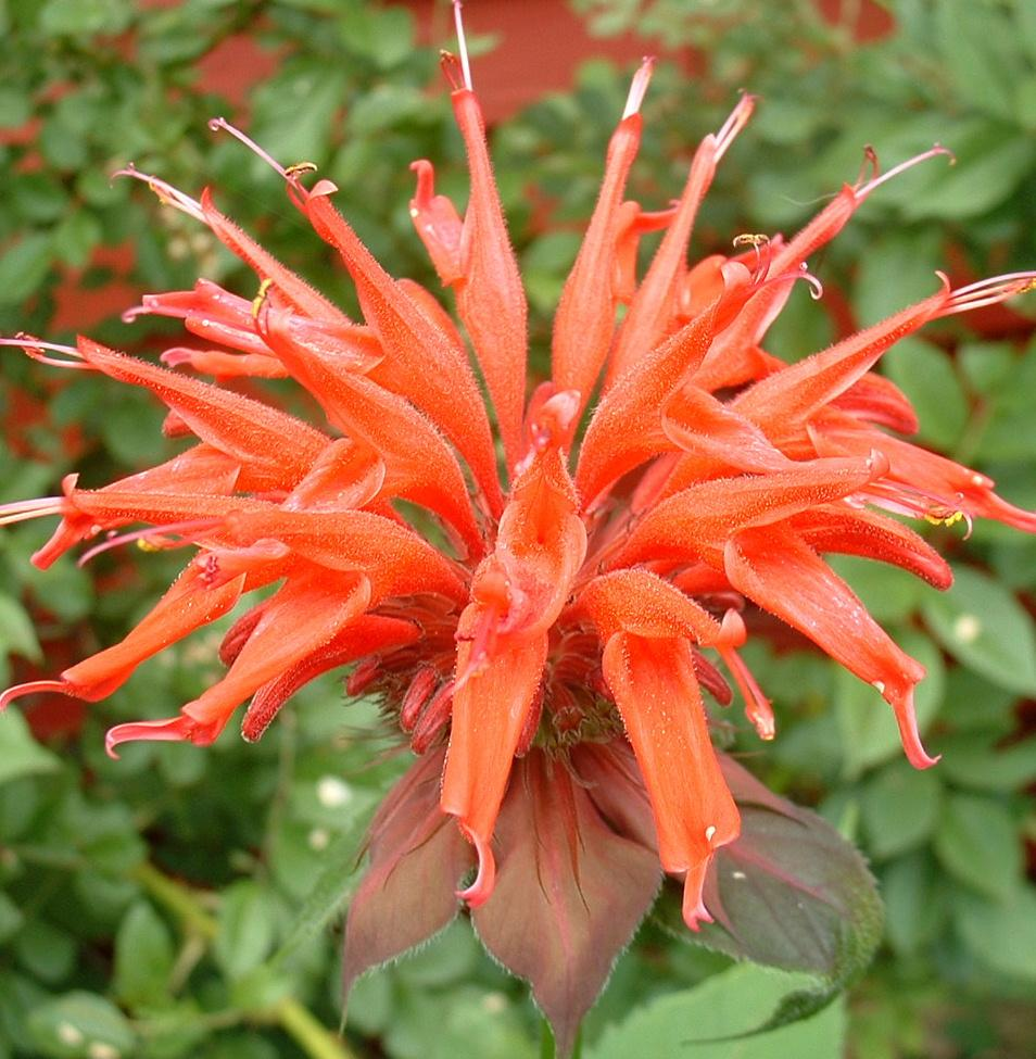 Bee balm